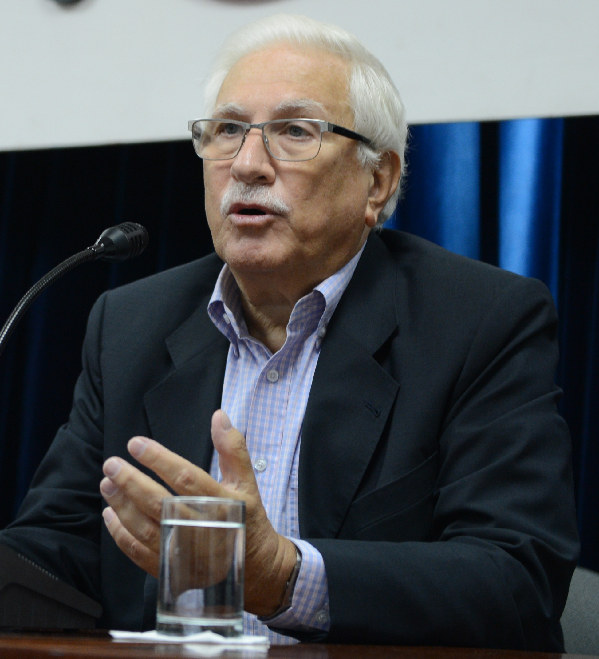 El director del INDEC, Jorge Todesca, señaló hoy que el objetivo de la nueva gestión es “ir reconstruyendo progresivamente a lo largo del año el conjunto de indicadores del Instituto para que podamos tener un 2016 estadísticamente completo y normalizado”. “Virtualmente hay cosas que tenemos que reconstruirlas de cero, en especial donde existe trabajo de campo, no porque la labor de los encuestadores haya sido individualmente mala sino porque ha sido sistemáticamente deficiente”, explicó Todesca en una conferencia de prensa que ofreció en la sede del organismo junto a la directora técnica, Graciela Bevacqua.